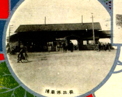 荒砥線赤湯-荒砥間開通記念絵葉書。1923年4月22日全通。